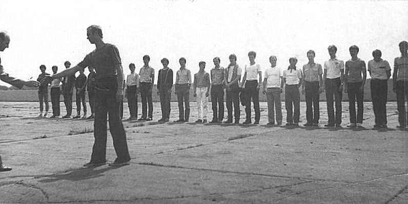 XV Spadochronowe Mistrzostwa Śląska Gliwice 1984, uroczyste otwarcie Mistrzostw - Sekcja Spadochronowa Aeroklubu Gliwickiego